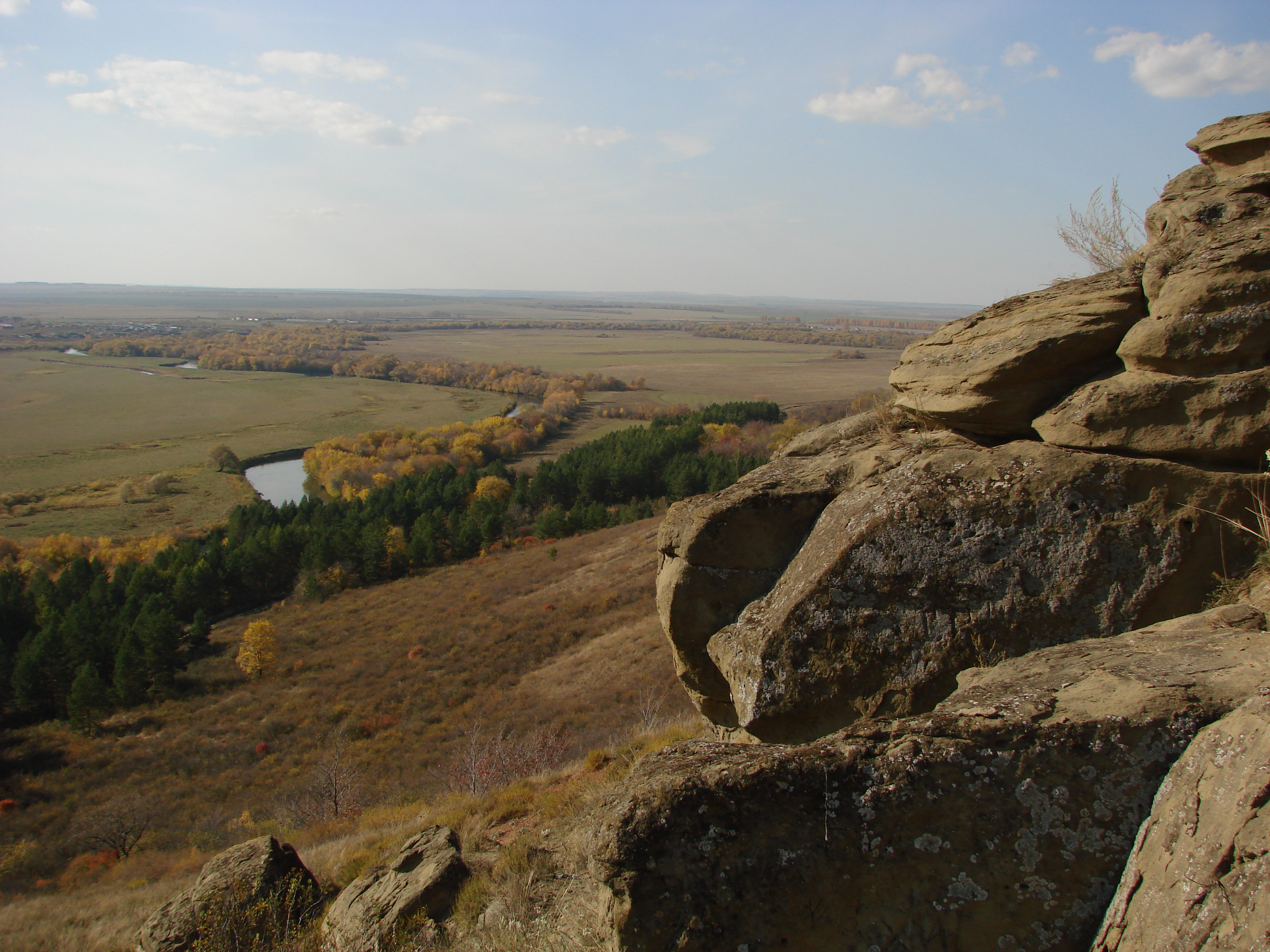 Река Ик, Азнакаевский район This image is related to the protected area of Russia number 1610007